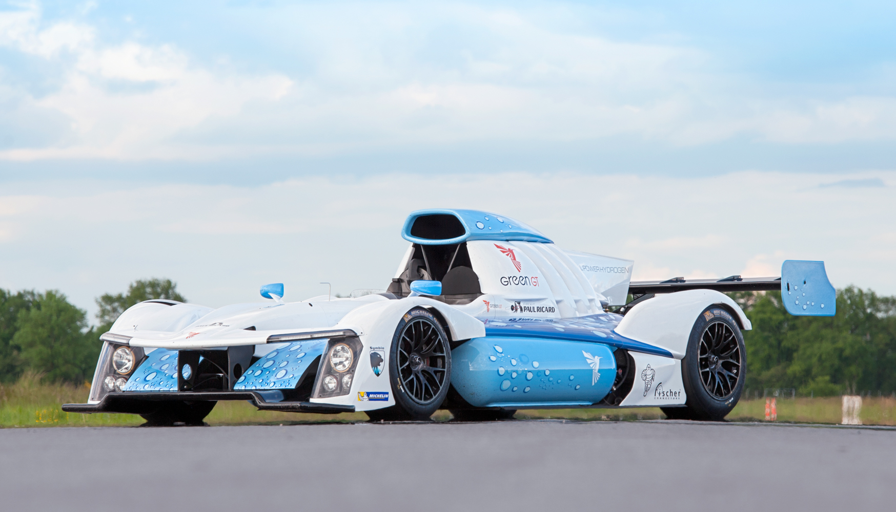 Vue 3/4 avant de la Green GT H2, voiture de course propulsée par un groupe 100% électrique-hydrogène, pendant un roulage sur le circuit de Lurcy-Lévis.